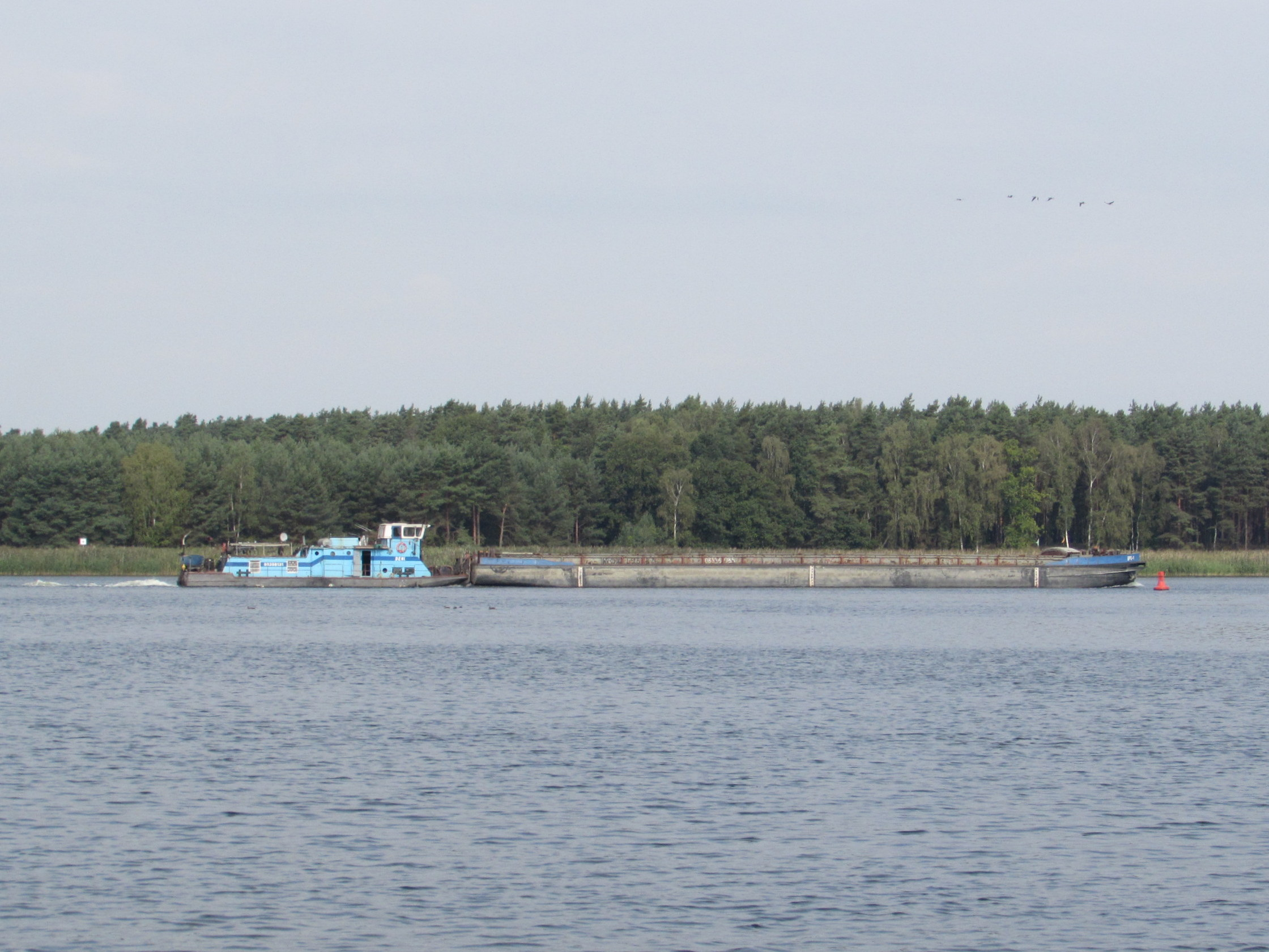 berufsschiffahrt auf der havel bei tieckow